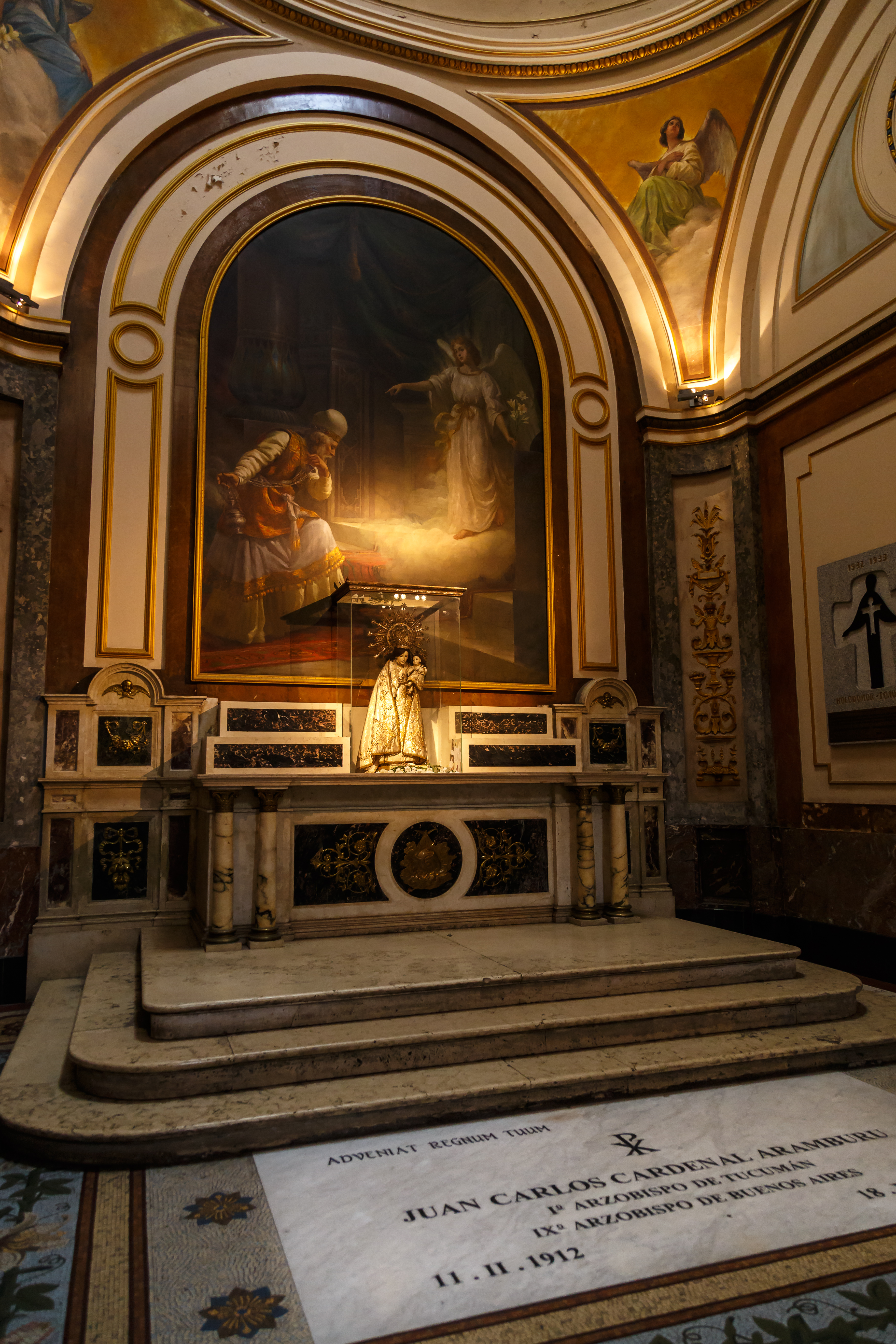 Interior de la Catedral Metropolitana de Buenos Aires. Capilla de San Juan Bautista. Altar de Nuestra Señora de los desamparados. Tumba del cardenal Juan Carlos Aramburu.